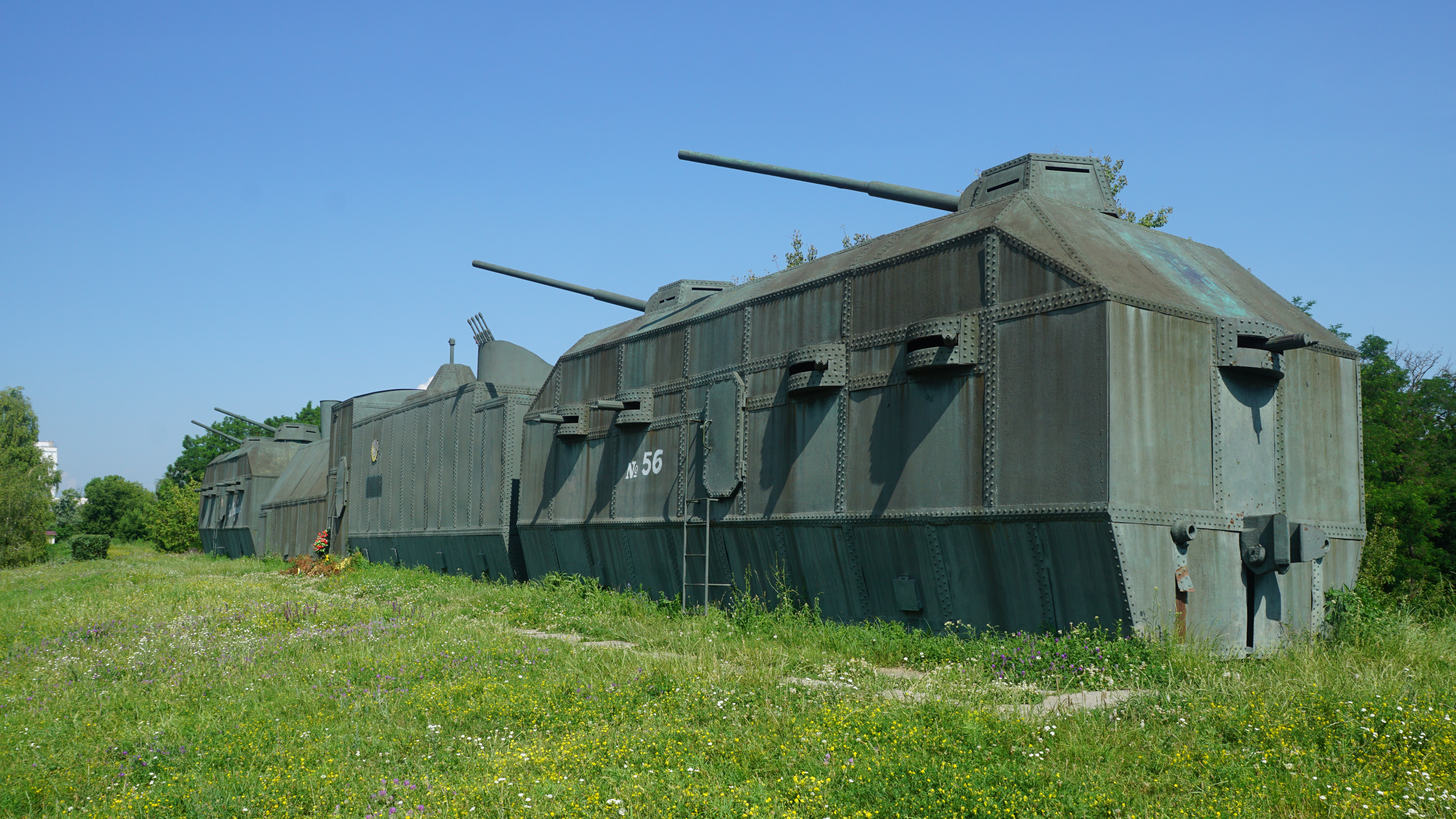 Модель бронепотягу БП-56 в Музеї військової техніки під відкритим небом в місті Канів.